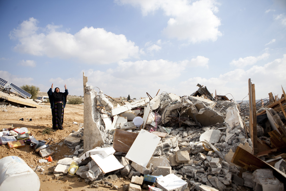 מראות באום אל - חיראן ביום השני שלאחר הפינוי. שרידי הרס ואישה מבכה ליד שרידי ההרס